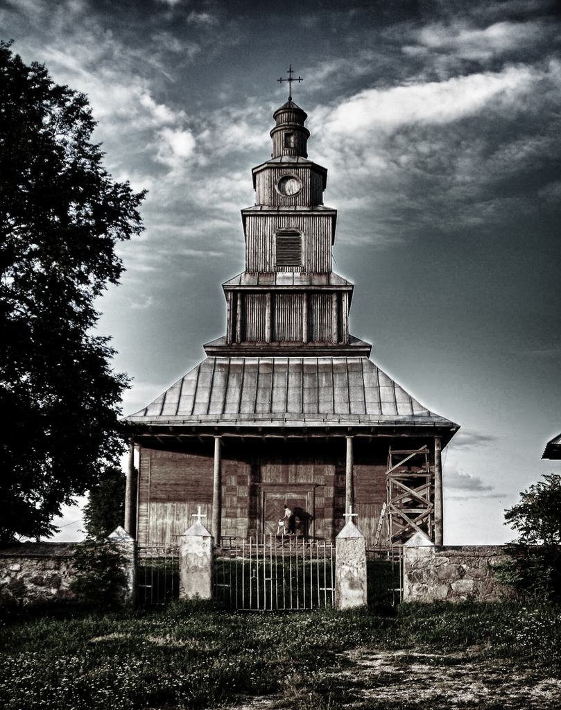 Беларуская (тарашкевіца): Драўляны Петрапаўлаўскі касьцёл у Дрысьвятах пабудаваны ў 1926 годзе. This is a photo of Belarusian heritage monument. Reference number: 213Г000188 ( WLM)